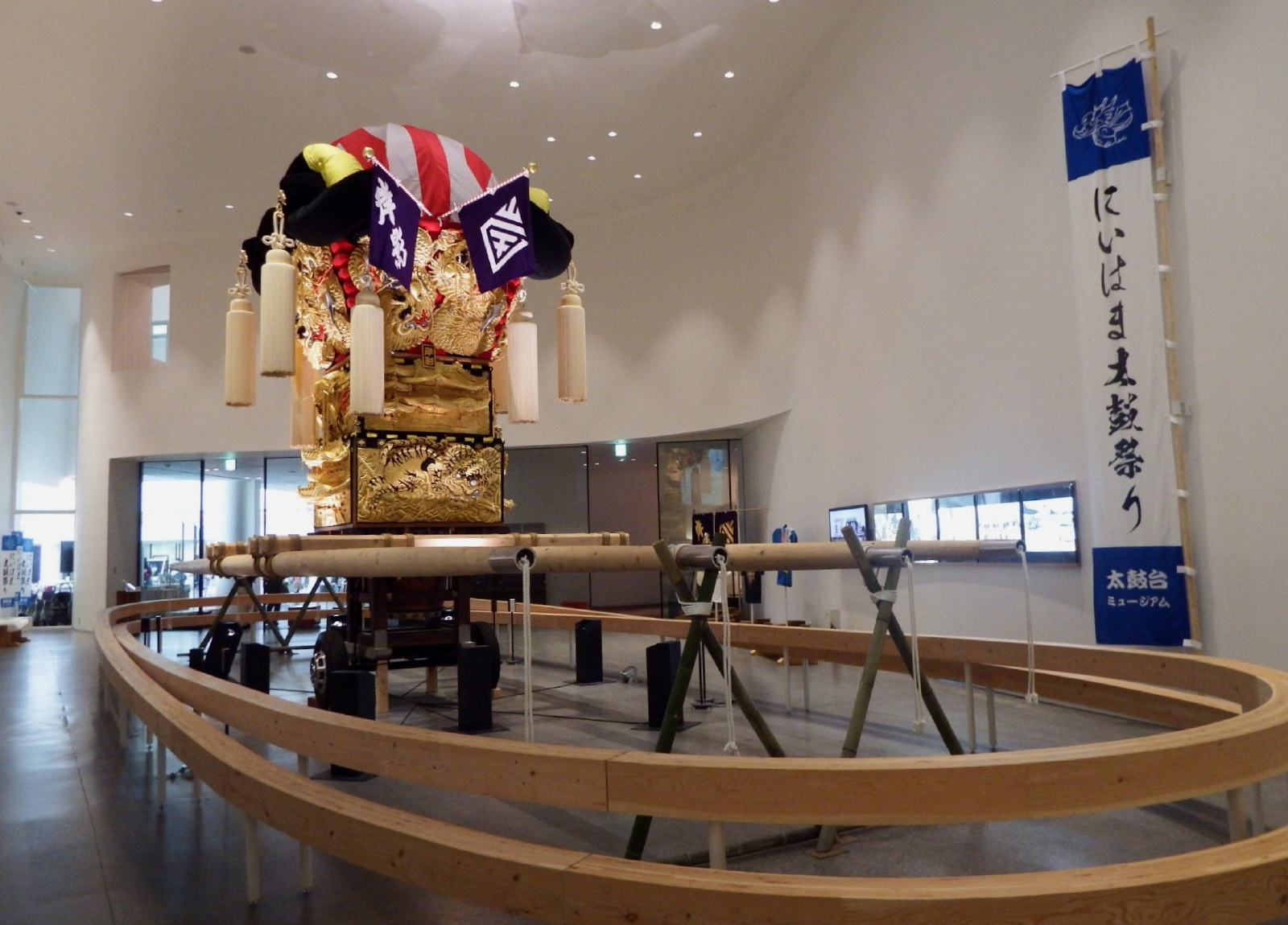 あかがねミュージアムの太鼓台